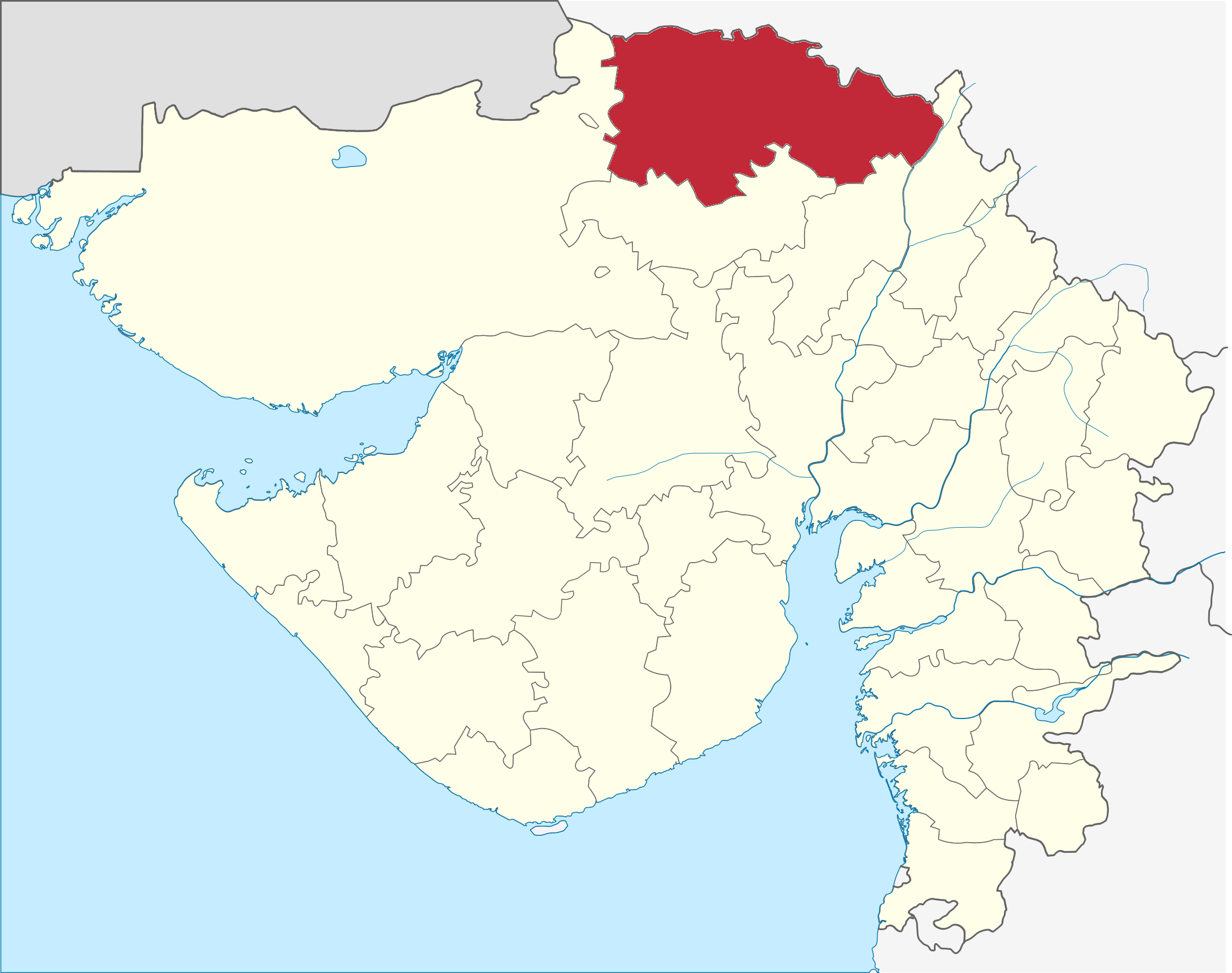 Distrito de Banaskantha en Gujarat